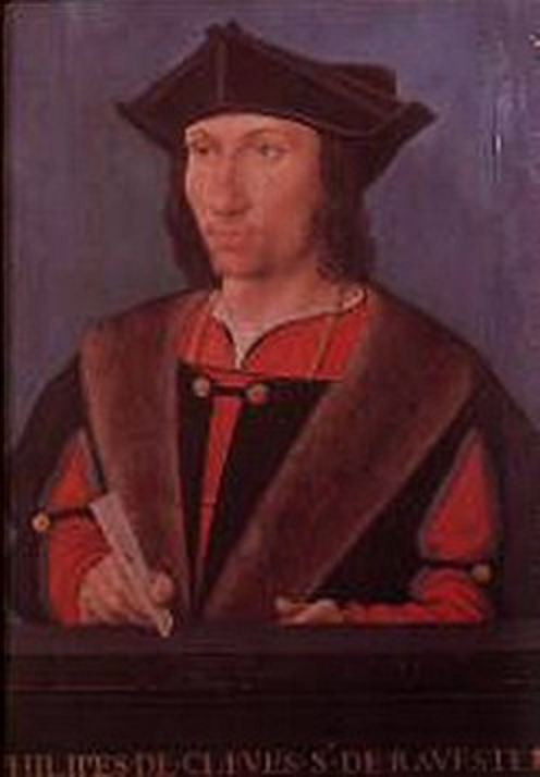 Potrait des Philipp von Kleve-Mark, Herr zu Ravenstein (* 1456 in Le Quesnoy; † 28. Januar 1528 auf Schloss Wijnendale). 1482 wurde er zum Mitglied des Regentschaftsrats für den jungen Herzog von Burgund, Philipp den Schönen von Habsburg, ernannt.